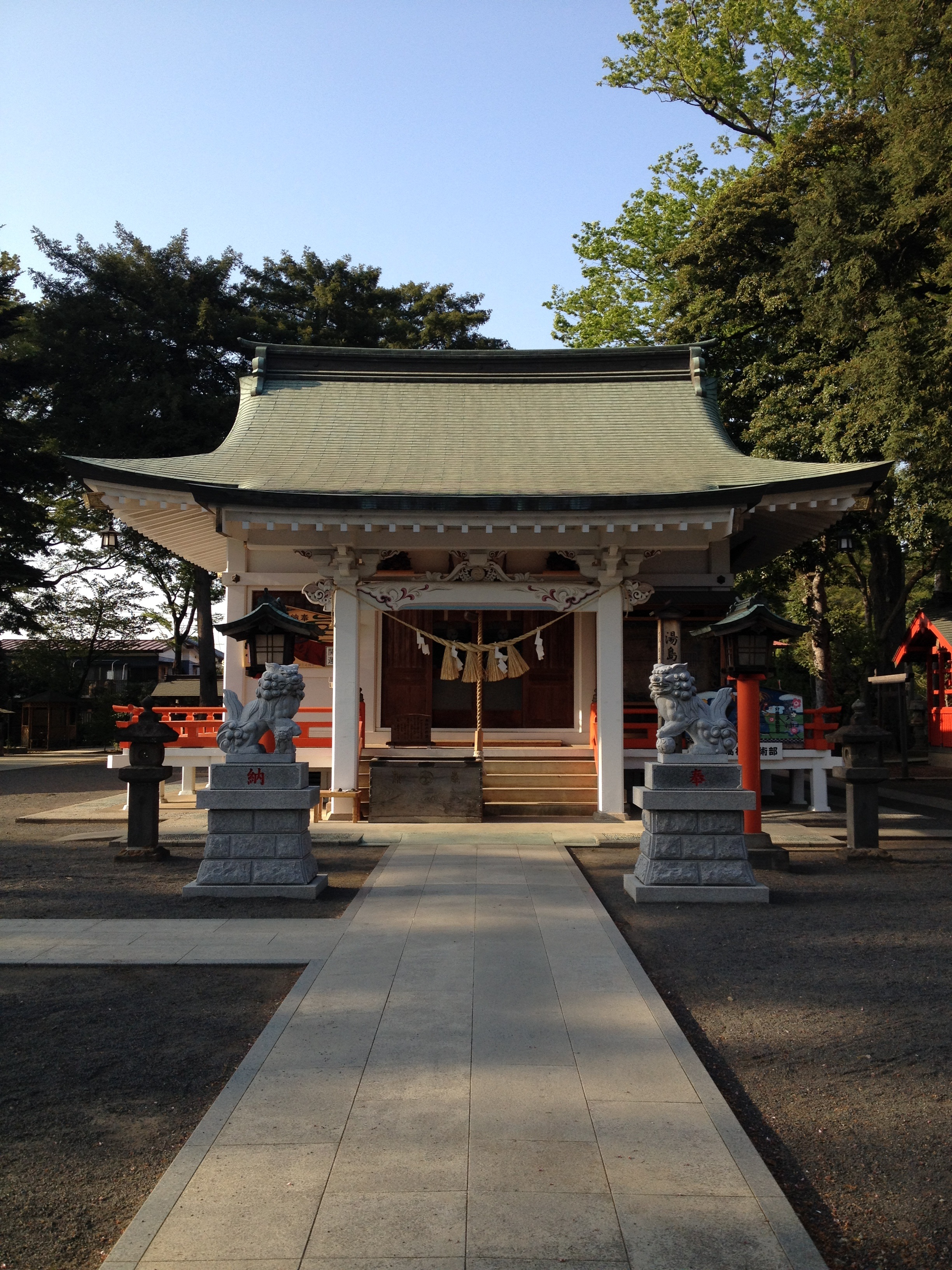 白岡八幡宮本殿。日本三「岡」八幡宮の一つとされている。（あとの 二つは鶴岡八幡宮、富岡八幡宮。）